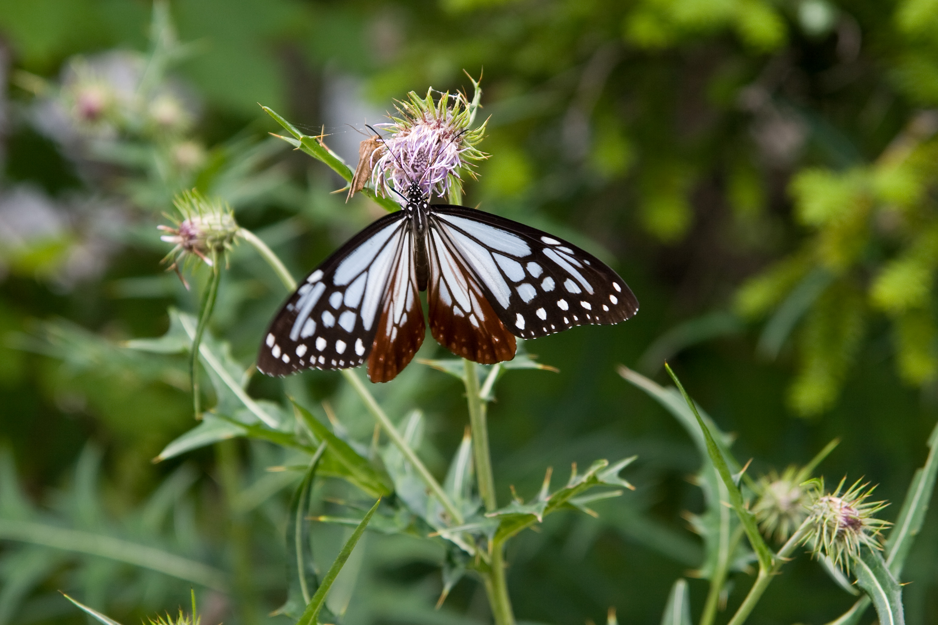 アサギマダラ (学名:Parantica sita)